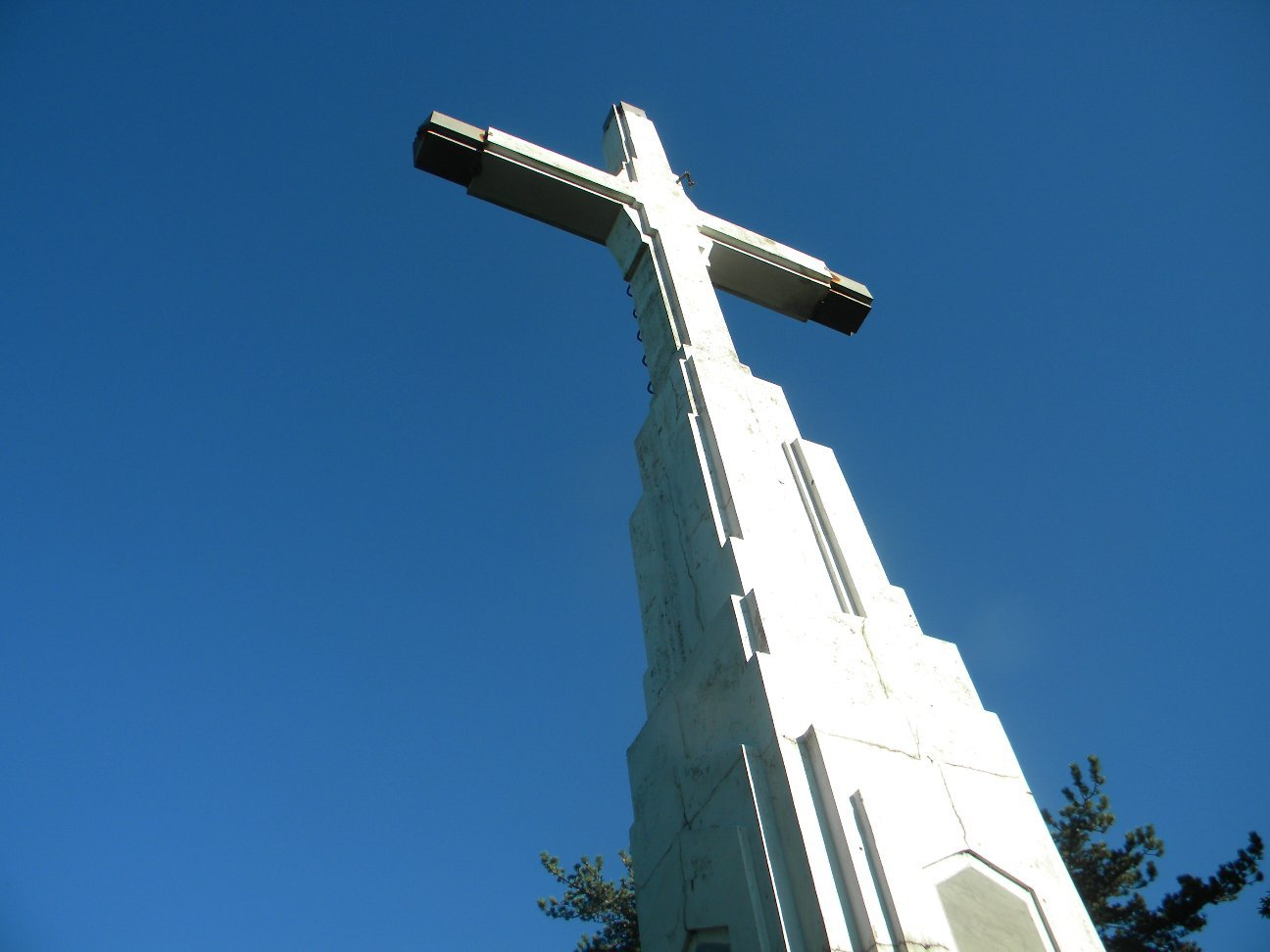 La Croce di Spotà, Rapallo, Liguria, Italia